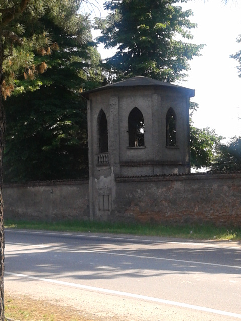 Strada statale del Sempione, torretta ornamentale a Costa San lorenzo, sul confine tra i comuni di Parabiago e Nerviano This is a photo of a monument which is part of cultural heritage of Italy.